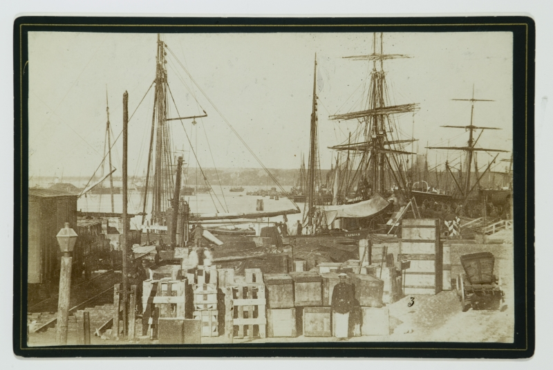 Tallinna sadam. Vaade sadamale Lasnamäe suunas. Esiplaanil kai, mille ääres purjekad. Kail kaubakastid, vasakul raudtee. Kaugemal sadamas laevad. Tagaplaanil Lasnamägi.